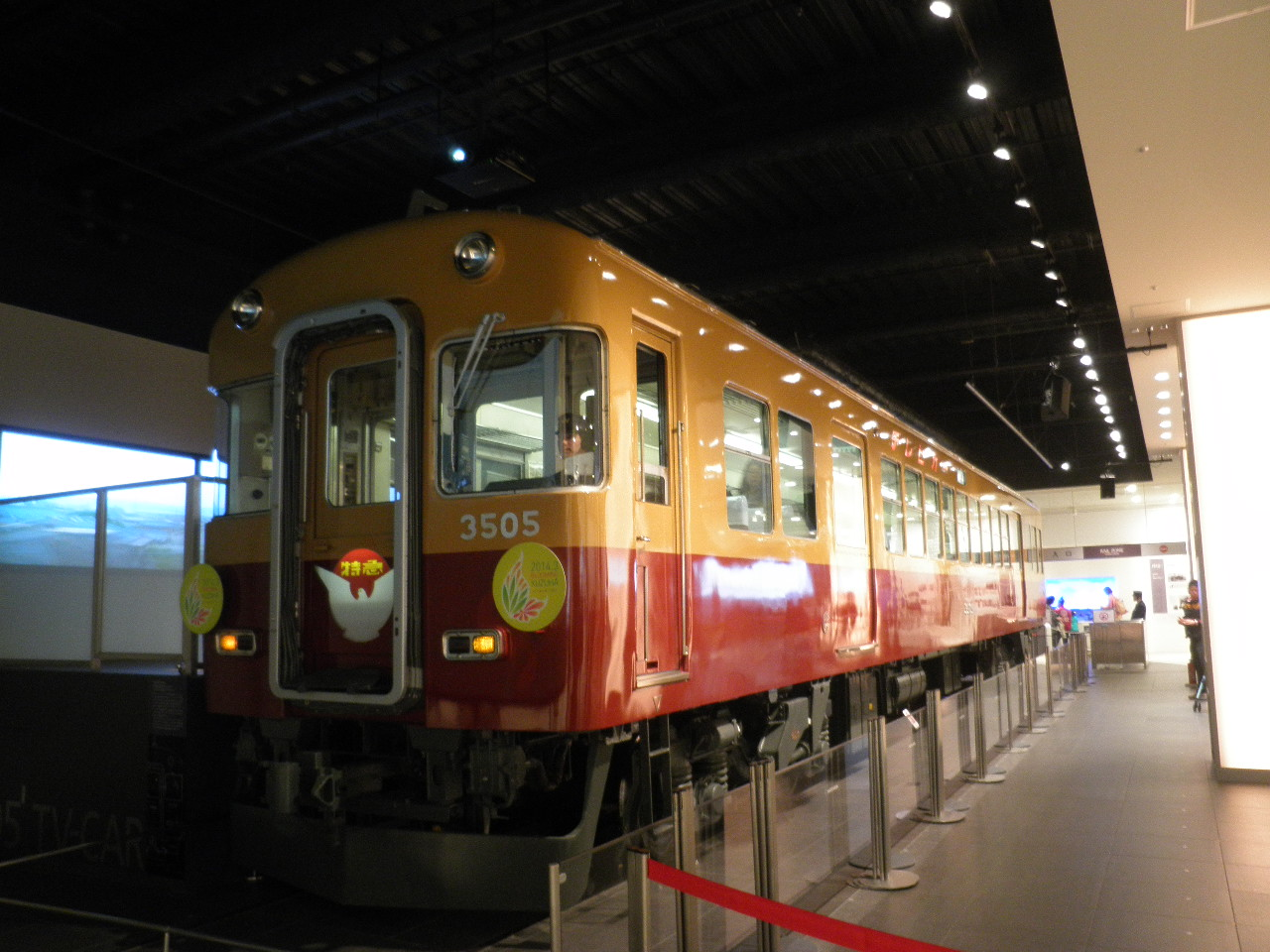 2014-3 くずはモール「SANZEN-HIROBA」にて撮影